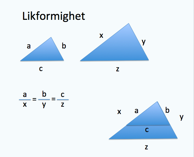 Likformighet och topptriangelsatsen